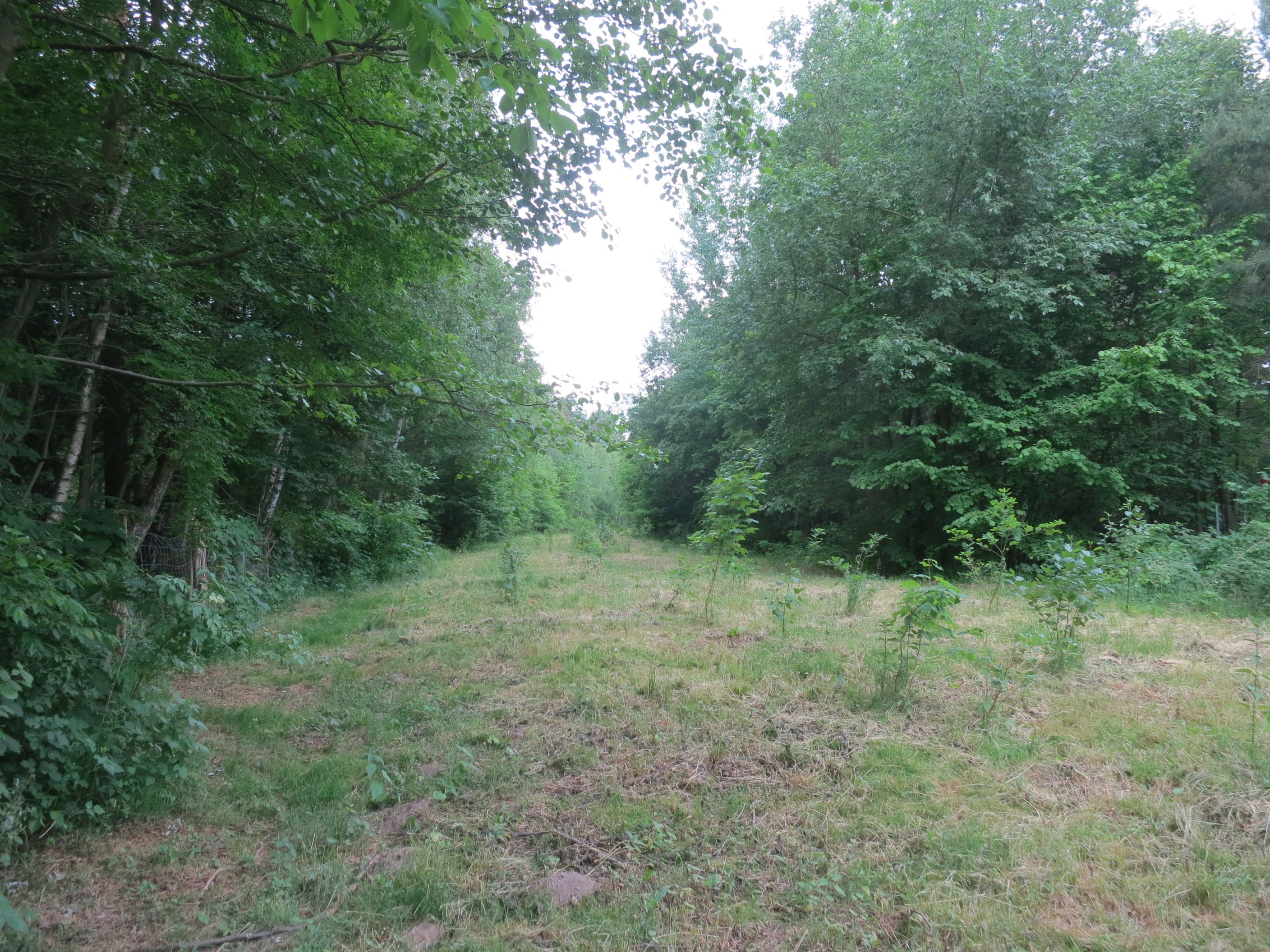 renaturierte alte Gütertrasse von Berlin-Grünau zum Flughafen, Wald bei Berlin-Bohnsdorf